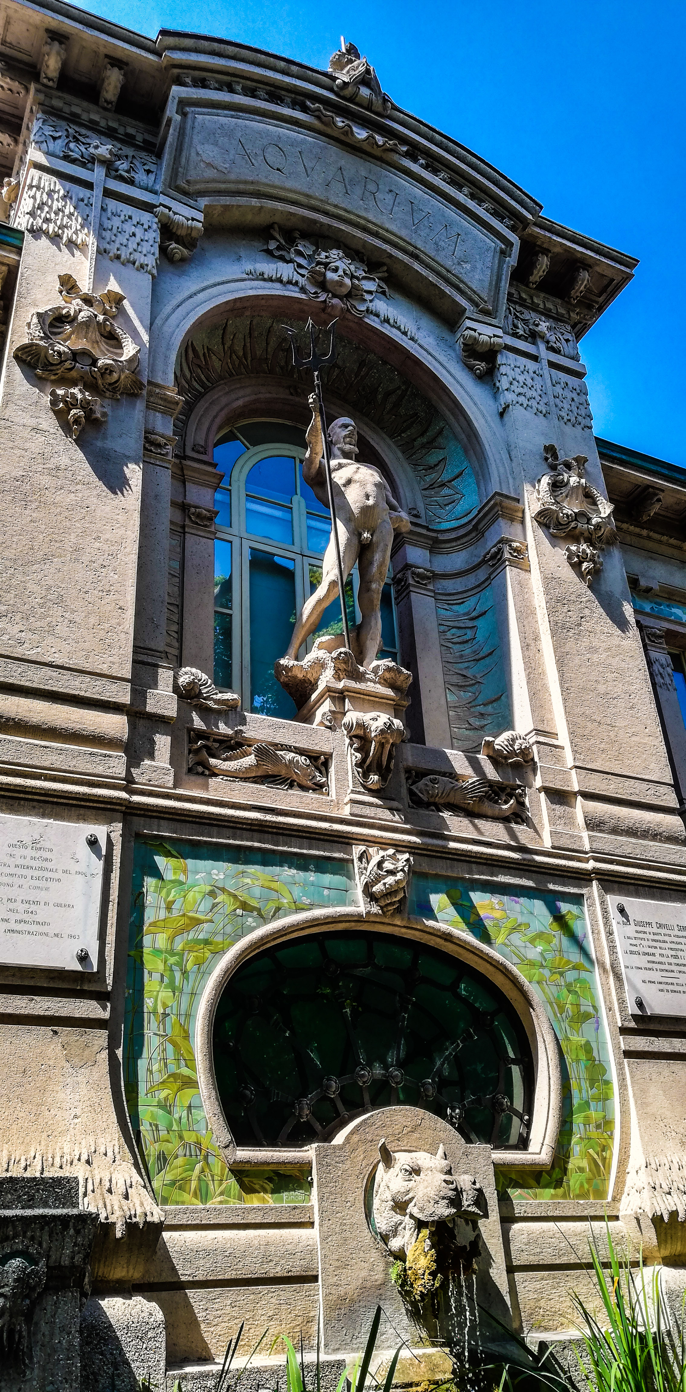 acquario civico di Milano This is a photo of a monument which is part of cultural heritage of Italy.